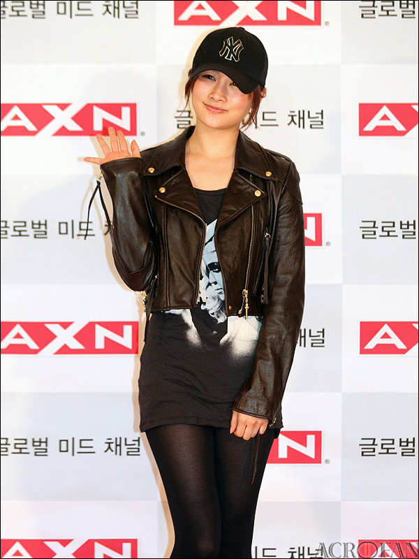 AXN코리아 한국 서비스 론칭 이벤트